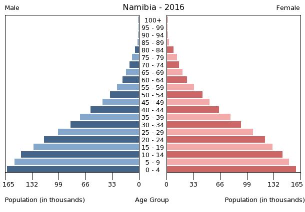 A population pyramid illustrates the age and sex structure of a country's population and may provide insights about political and social stability, as well as economic development. The population is distributed along the horizontal axis, with males shown on the left and females on the right. The male and female populations are broken down into 5-year age groups represented as horizontal bars along the vertical axis, with the youngest age groups at the bottom and the oldest at the top. The shape of the population pyramid gradually evolves over time based on fertility, mortality, and international migration trends.